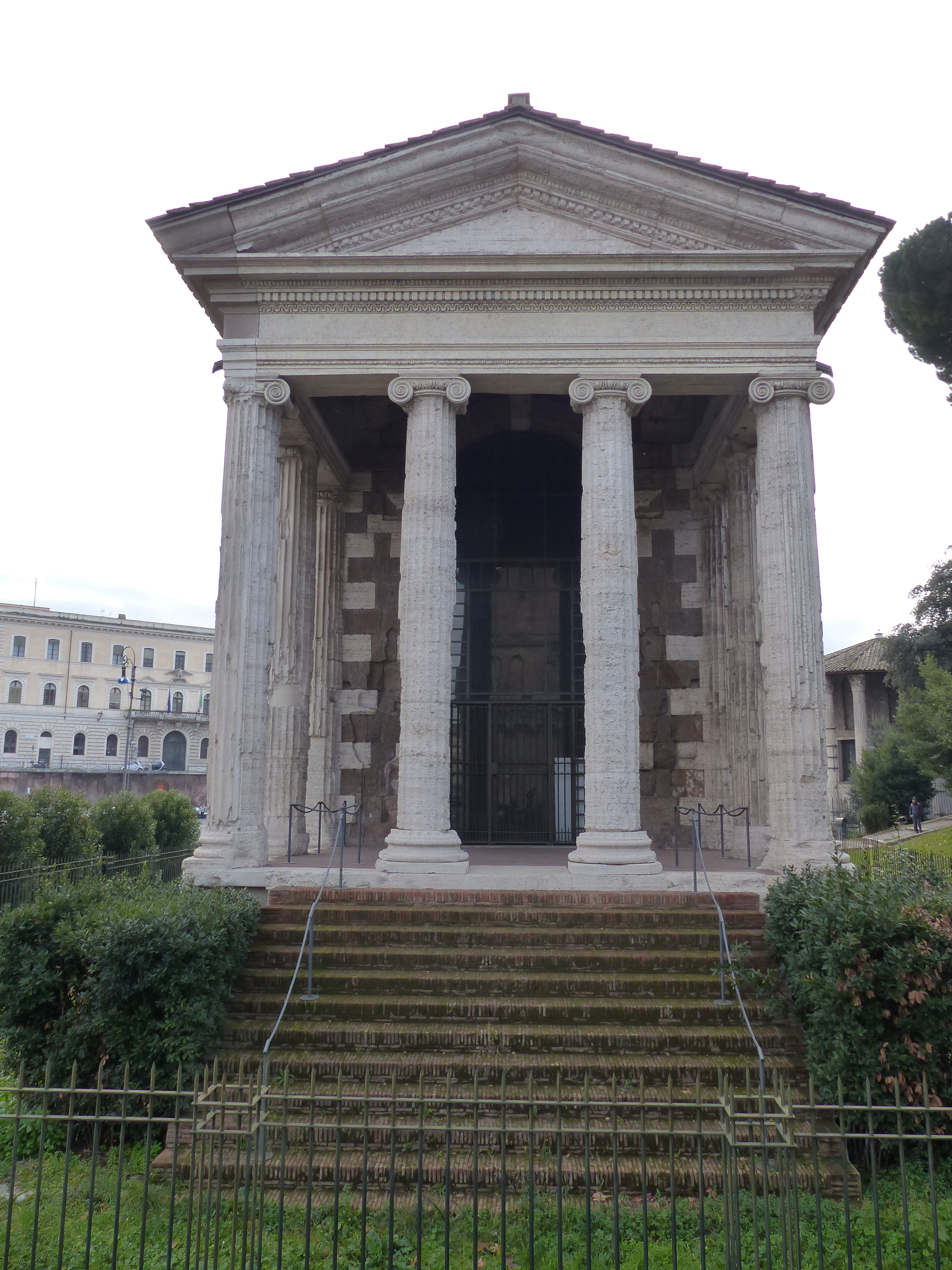 Templo de Portuno, Roma